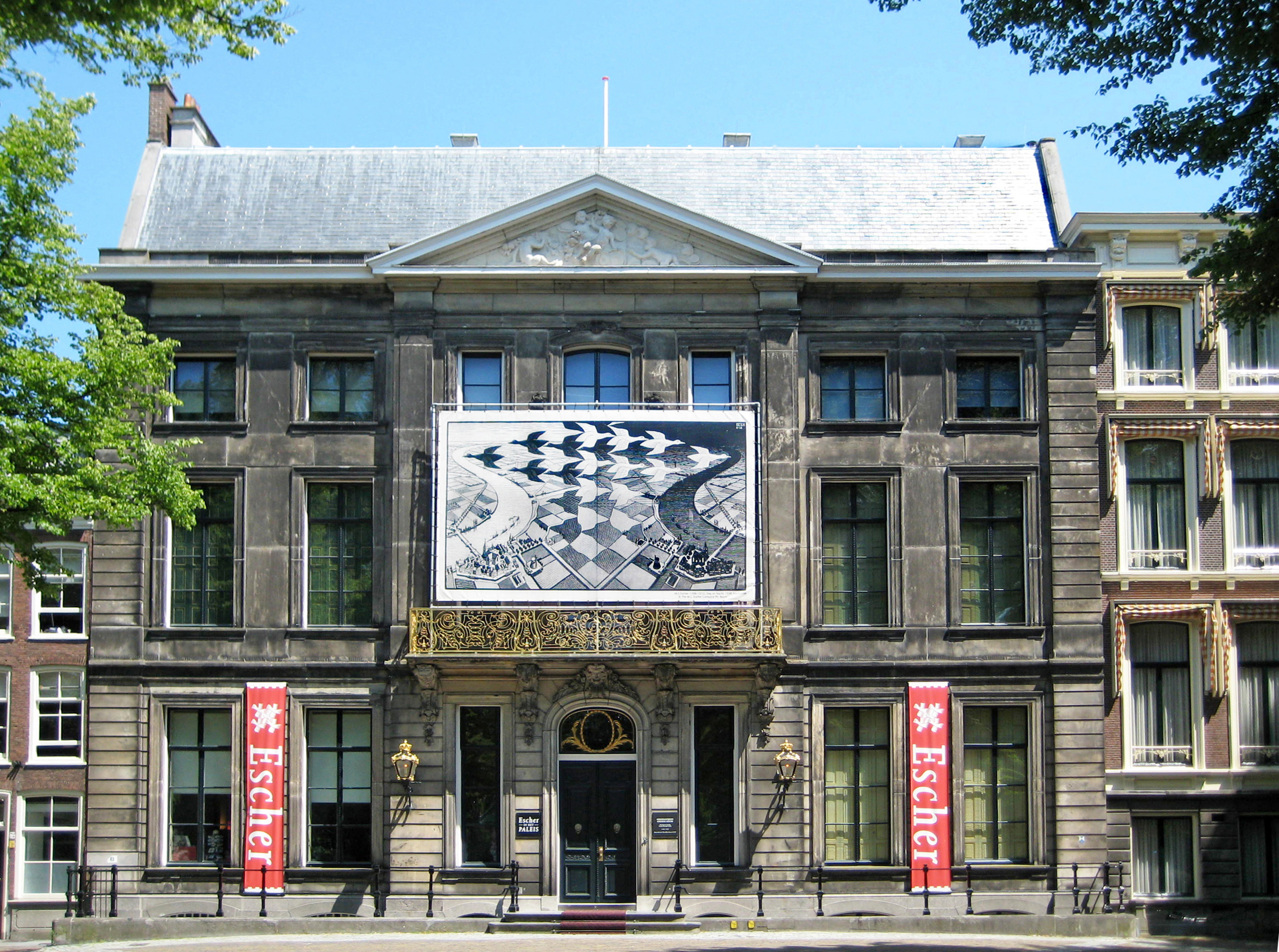 Paleis het Lange Voorhout, sinds 2002 is hier Escher in Het Paleis gevestigd.